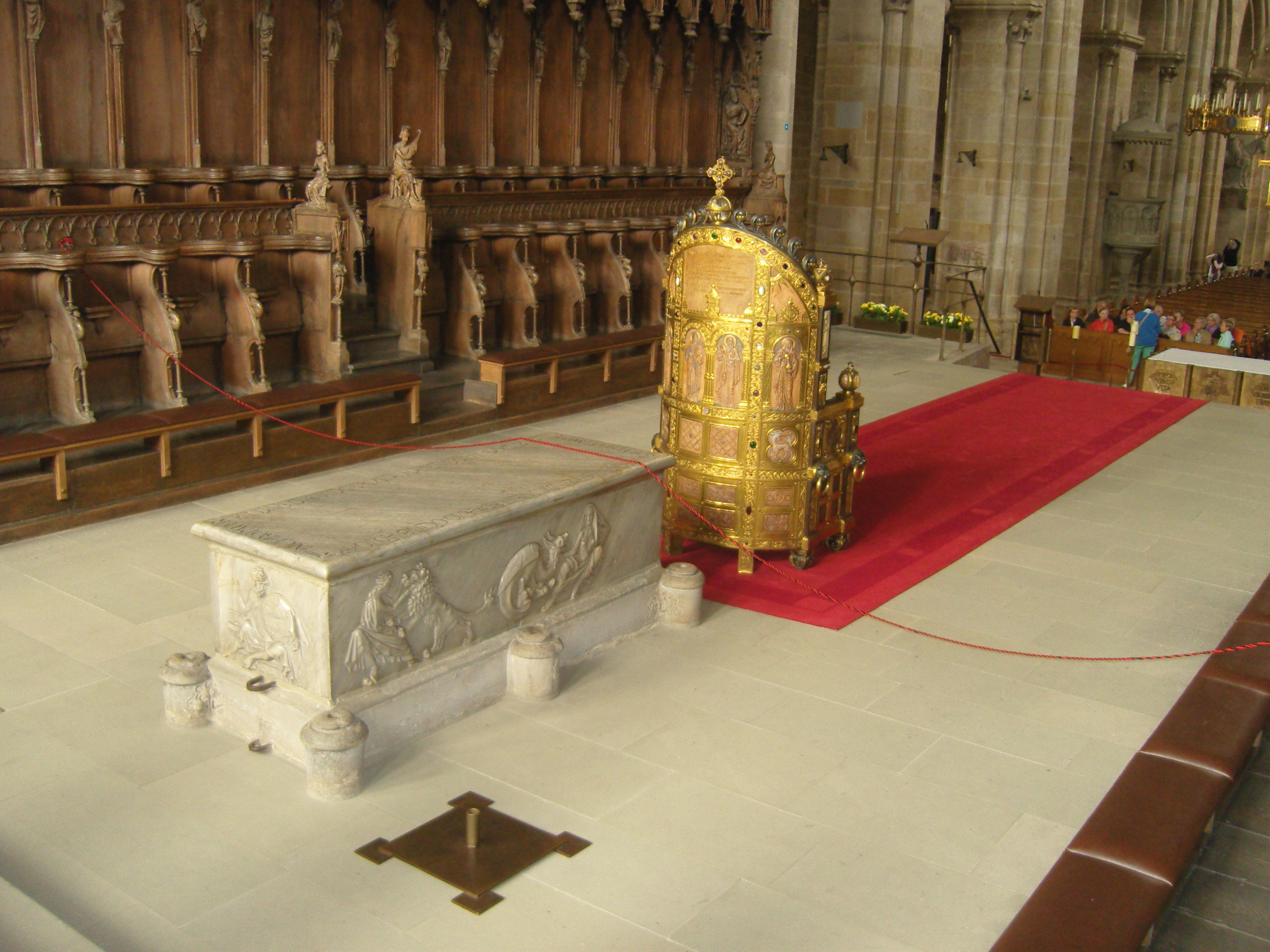 Bamberger Dom; Sarkophag und Bischofsstuhl im AltarraumThis is a photograph of an architectural monument.